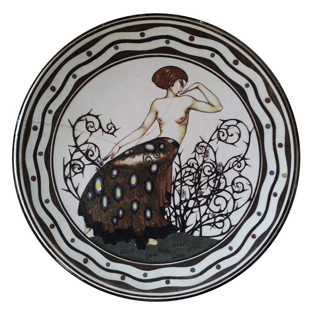 Aldo Castelli – Figura femminile danzante tra i rovi, piatto, Manifattura S.P.A.D.A., circa 1924